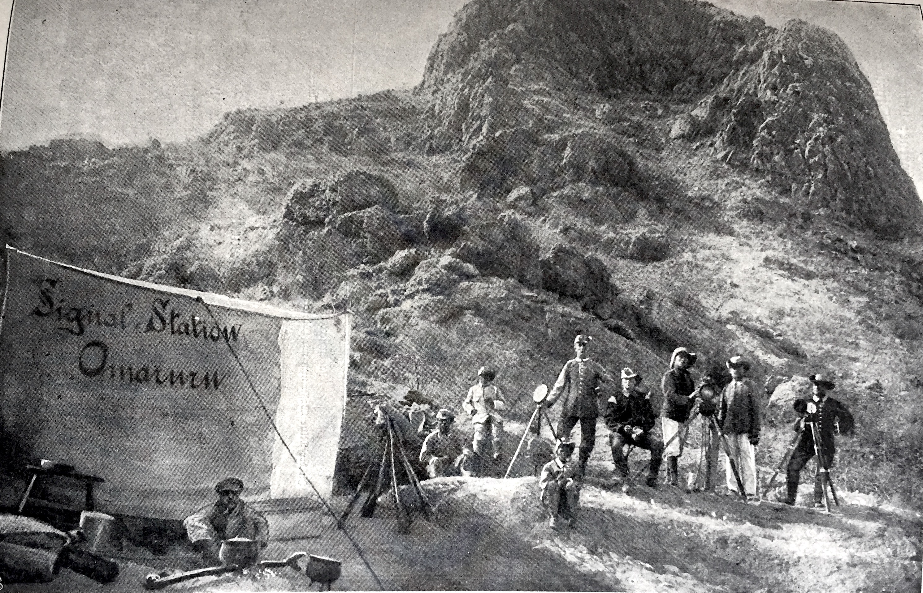 Signal Station Omaruru (1904) im ehemaligen Deutsch-Südwest-Afrika 1904